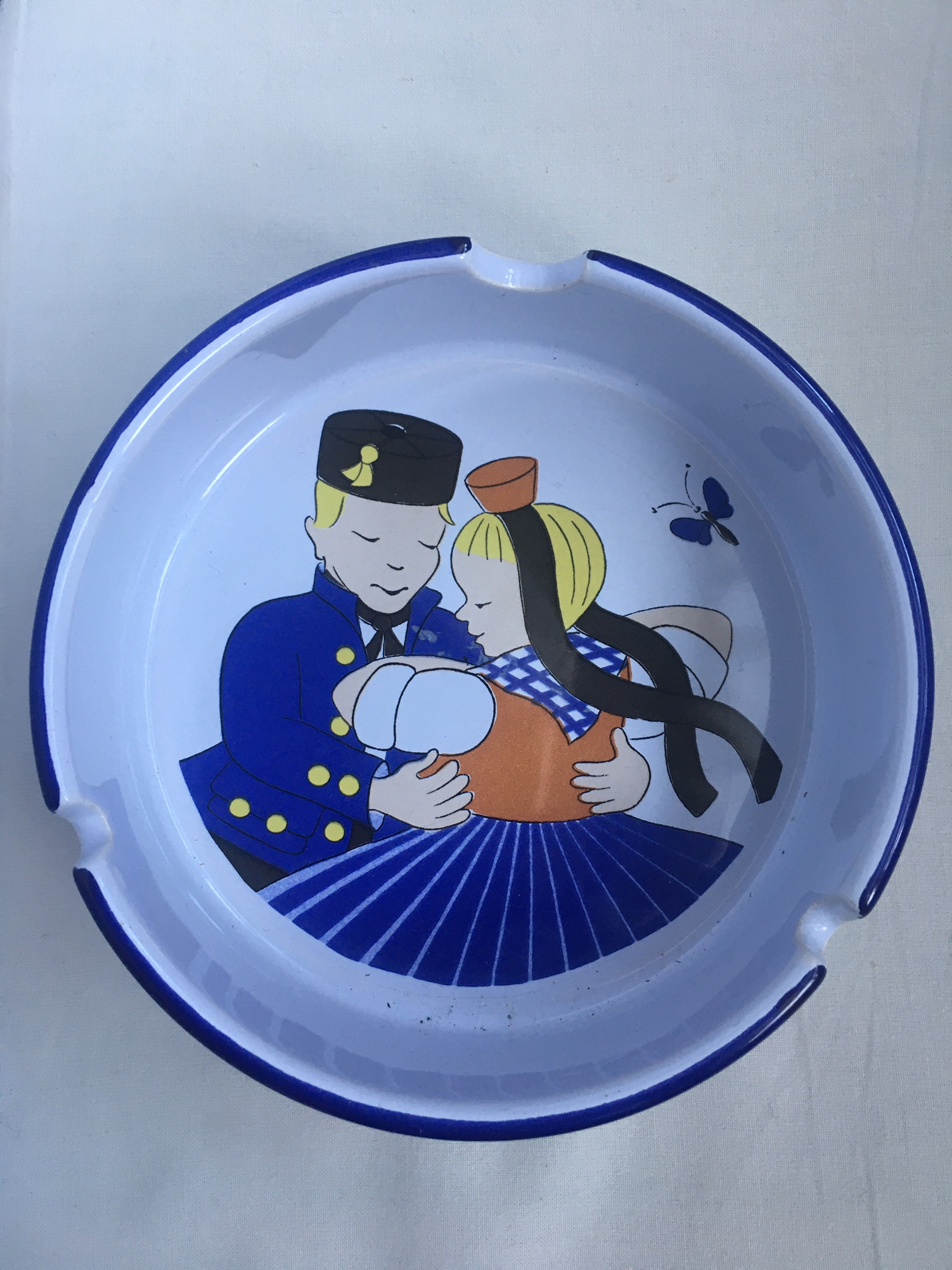 Waechtersbacher Keramik, Tanzendes Paar, Design - Ursula Fesca